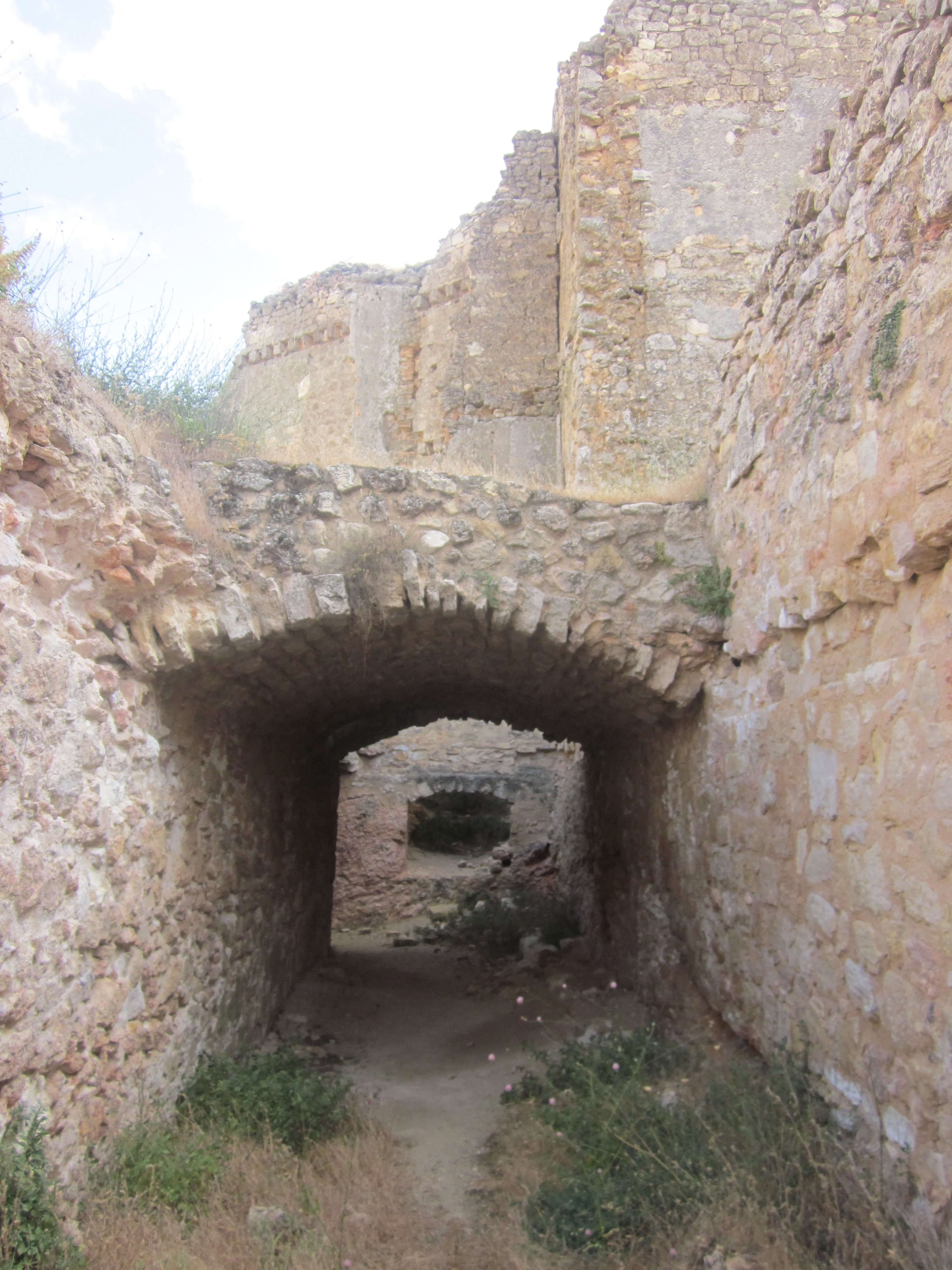 Caballerizas del castillo de Puebla de Almenara. Cuenca